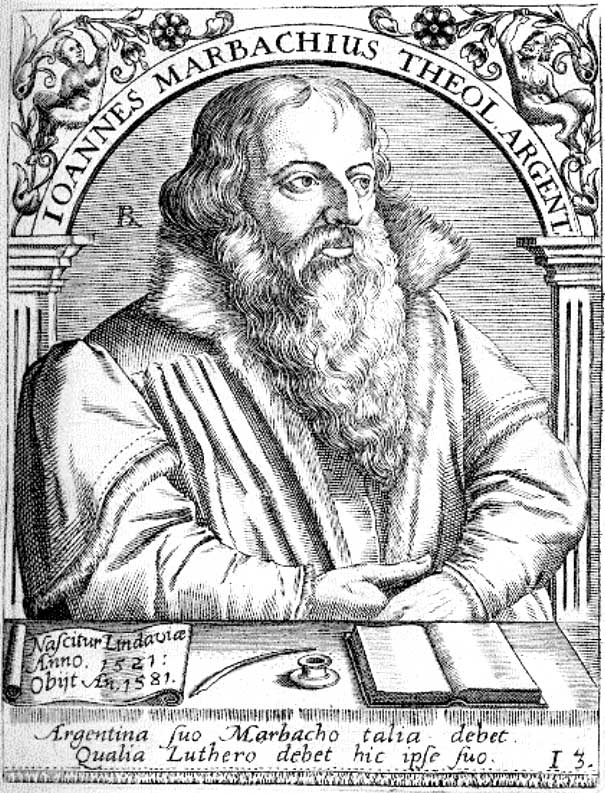 Kupferstich Johannes-Marbach (1521-1581); Theologe, Führer der Straßburger Lutheraner